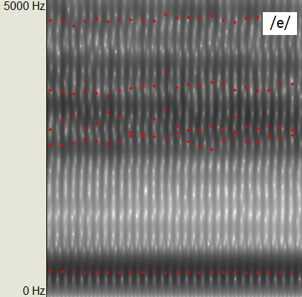 Keskkõrge eesvokaali /e/ spektrogramm (naiskeelejuht)